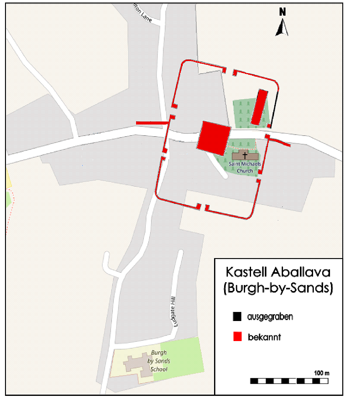 Befundplan des Kastell Aballava (Burgh by Sands), Hadrianswall, 2. Jahrhundert n.Chr.